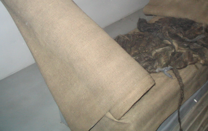 Włosianka z ludzkich włosów. Zdjęcie wykonane w Muzeum Auschwitz-Birkenau. Autor: Goku122 Data: 12.08.2005